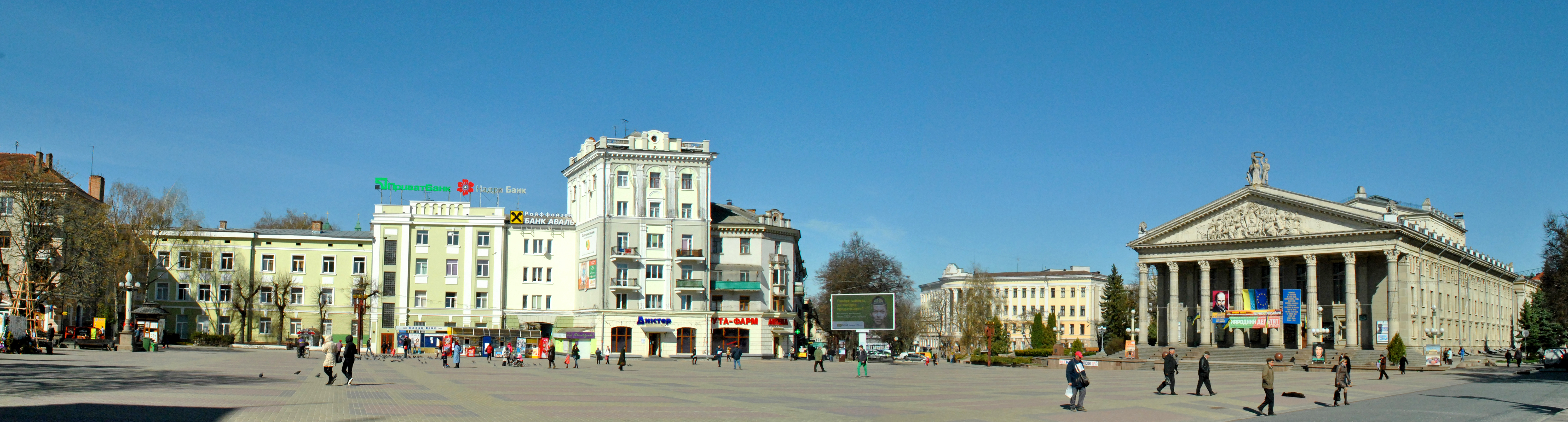 Театральний майдан у м. Тернопіль. Пам'ятки архітектури: житлово-торгівельний будинок на вул. Грушевського, 1 і Тернопільський академічний обласний драматичний театр імені Тараса Шевченка (2 квітня 2014 року).